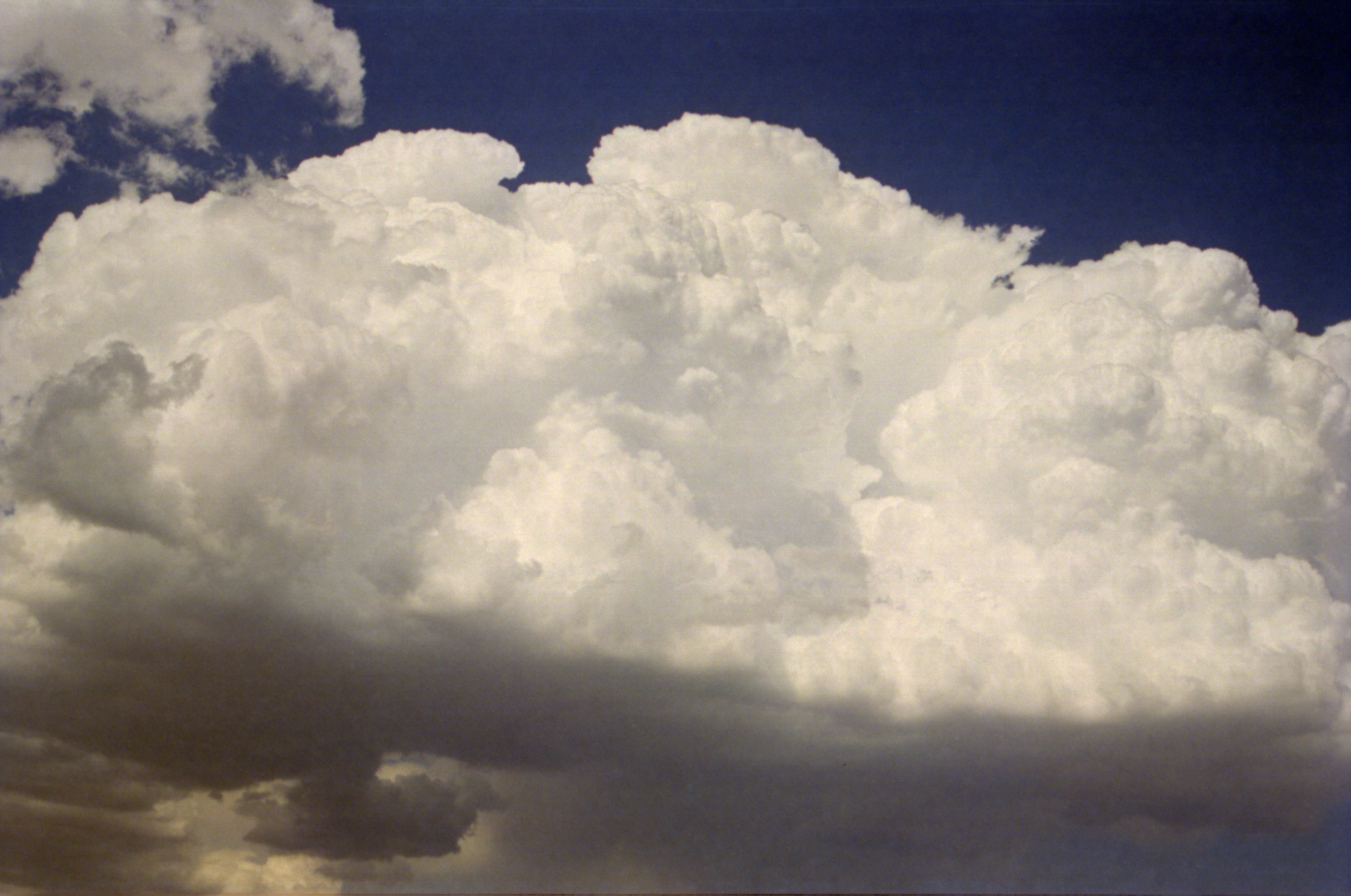 Cumulonimbus multicellulaire au dessus des Grandes Plaines américaines